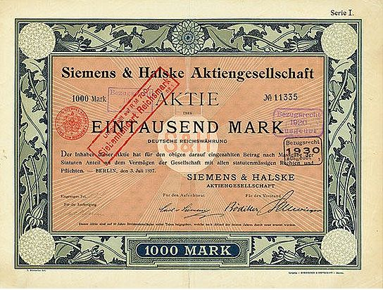 Erstes Zertifikat der Siemens & Halske AG, gestaltet von Ludwig Sütterlin 1897